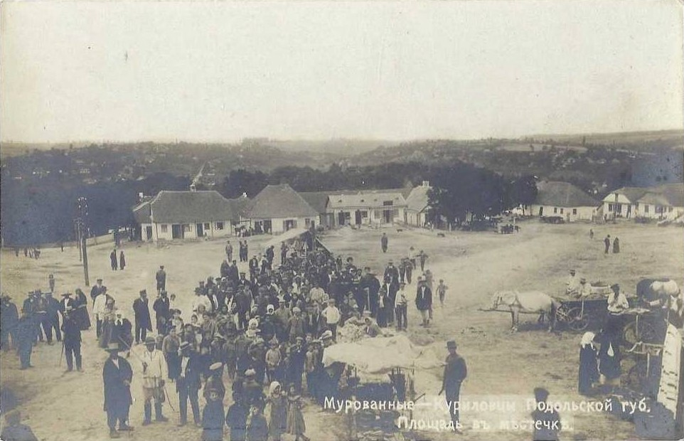 Муровані Курилівці. Ринок.: Поштова картка.